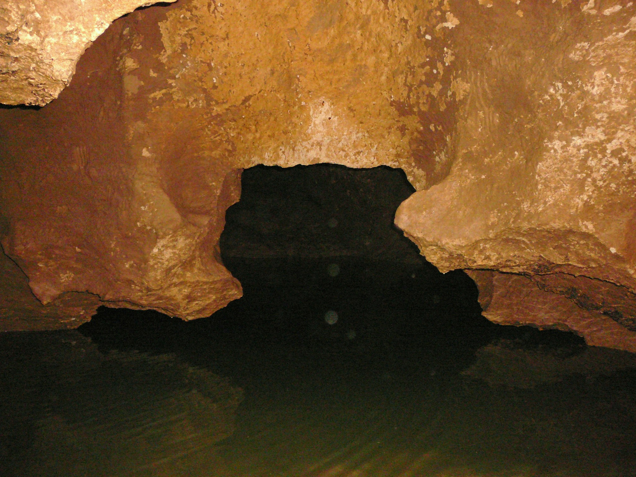 il lago Roner nella grotta Calgeron